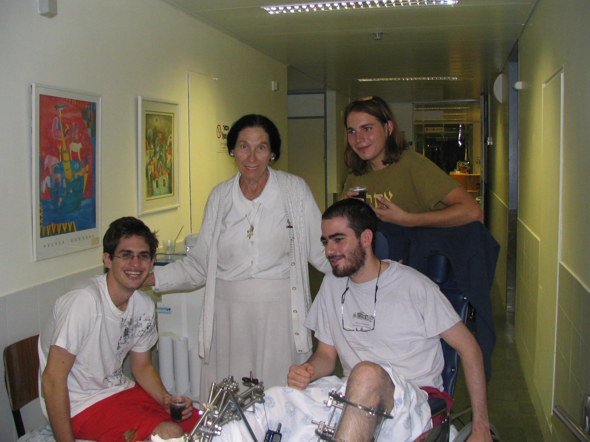 חולדה גורביץ, "אם הפצועים", מבקרת את הלוחמים הפצועים עשהאל לובוצקי וגדעון גולדנברג ממלחמת לבנון השנייה. 2006 Lebanon War Asael Lubotzky